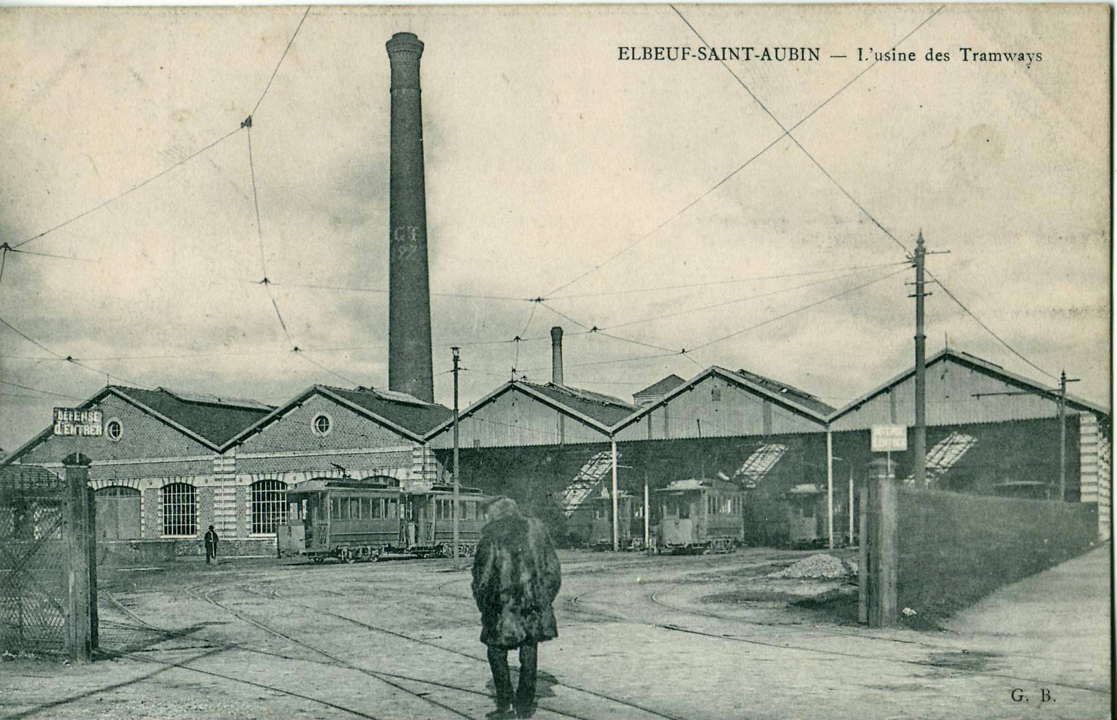 Carte postale ancienne éditée par G. B. : Saint-Aubin-lès-Elbeuf - L'usine des tramways (Tramway d'Elbeuf)